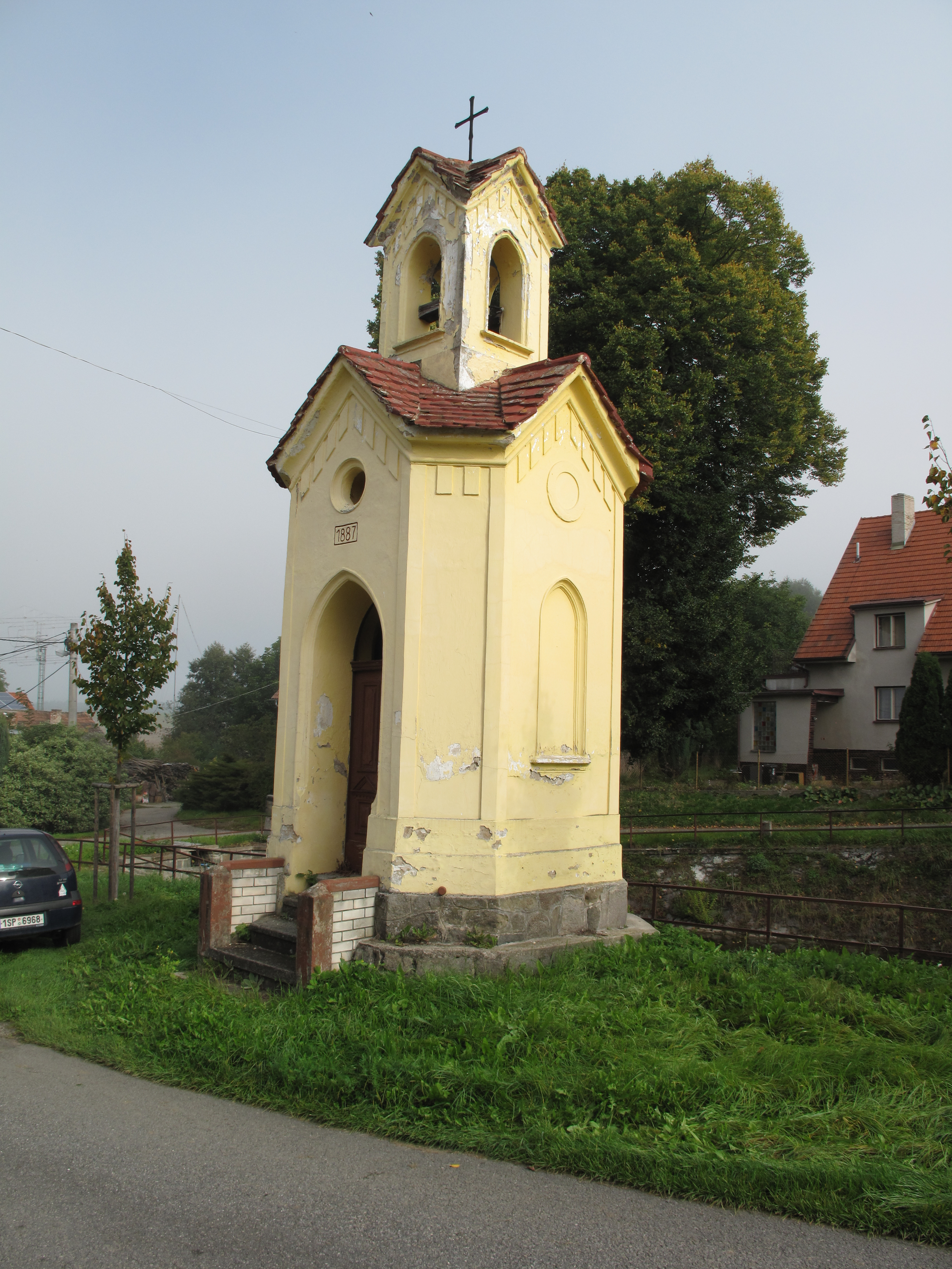 Kaplička ve Zbožnicích. Okres Benešov, Česká republika.